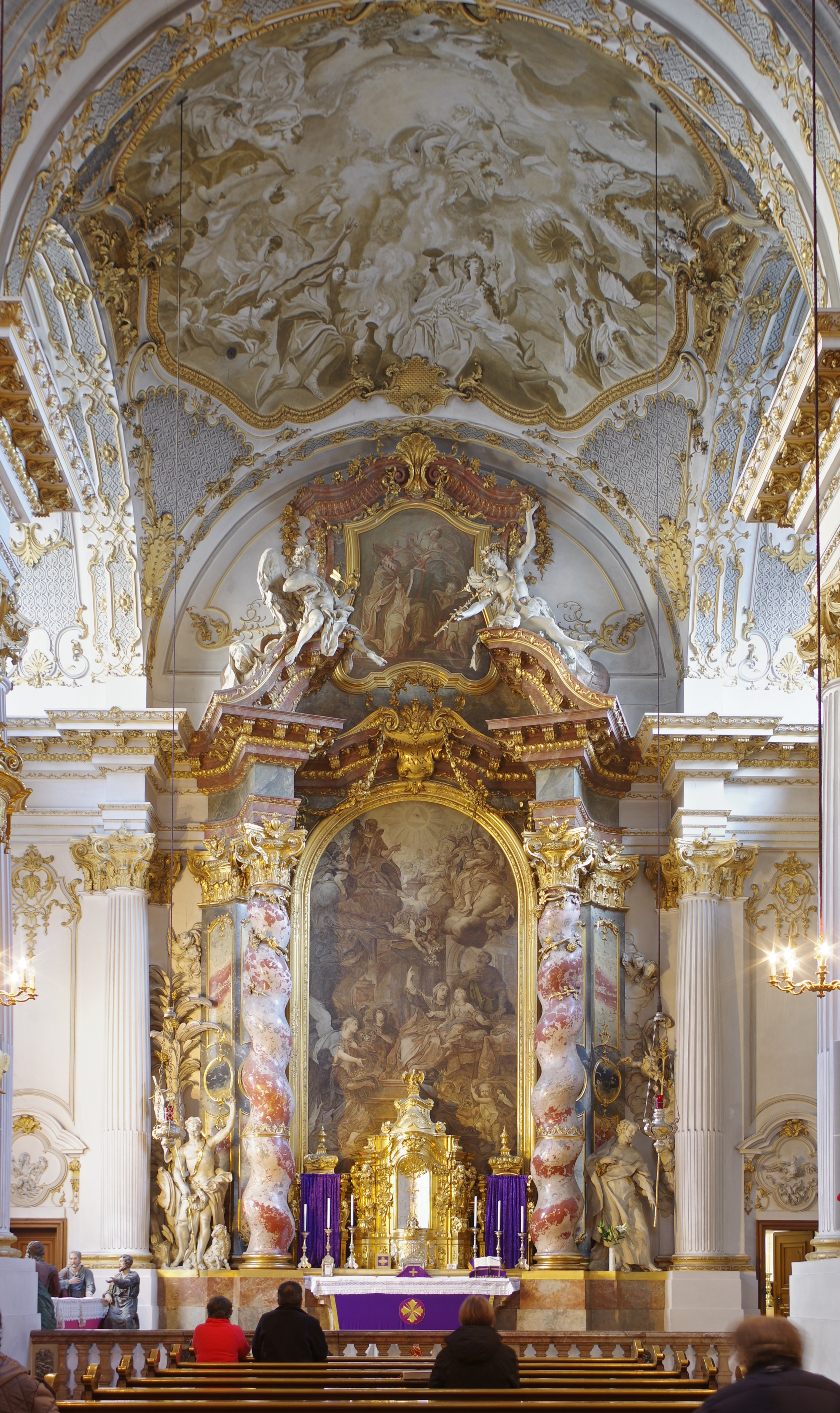 München,Damenstiftstraße 1, Kath. Damenstiftskirche St. Anna, Akten-Nr. D-1-62-000-1214